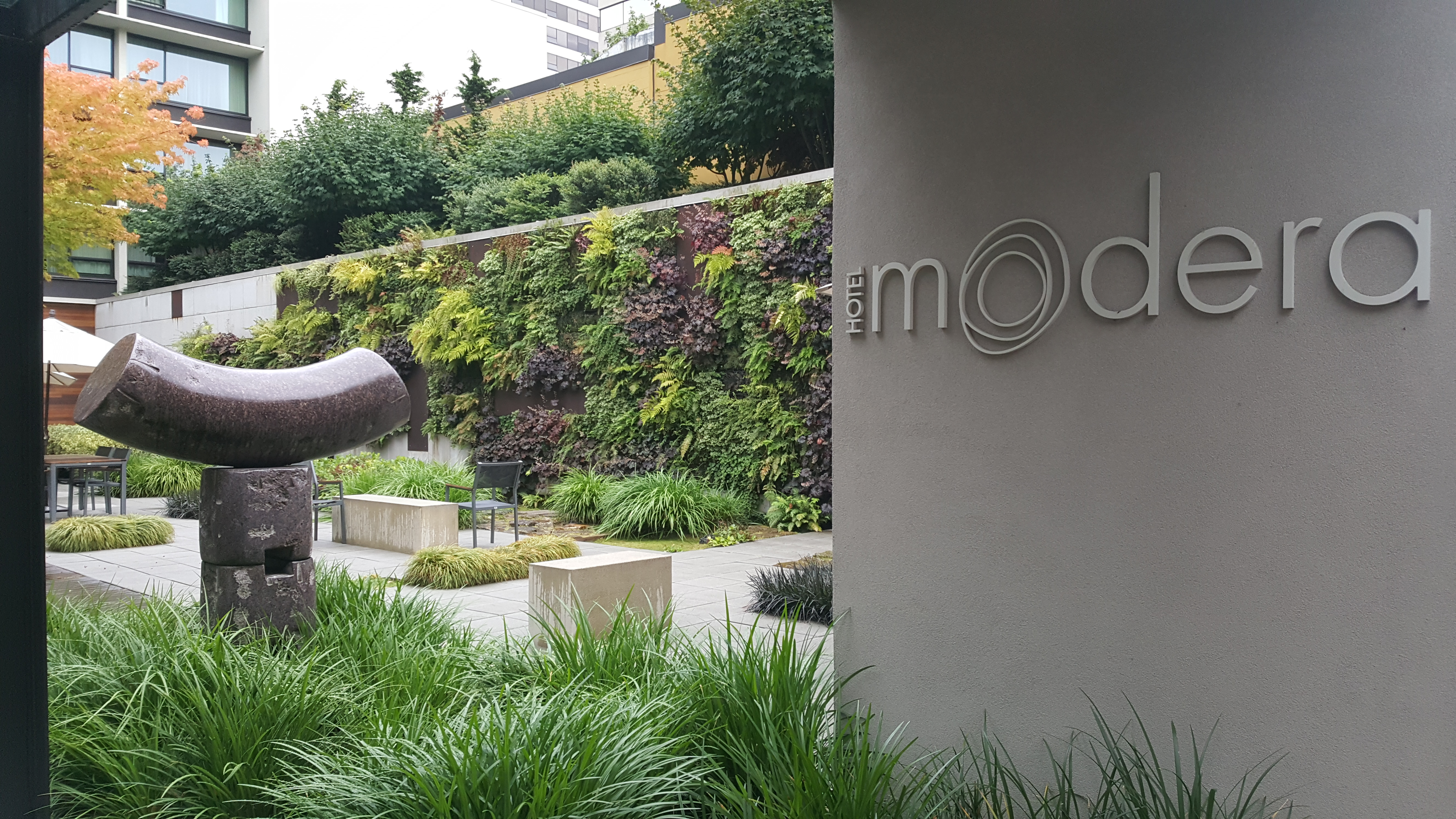 Hotel Modera